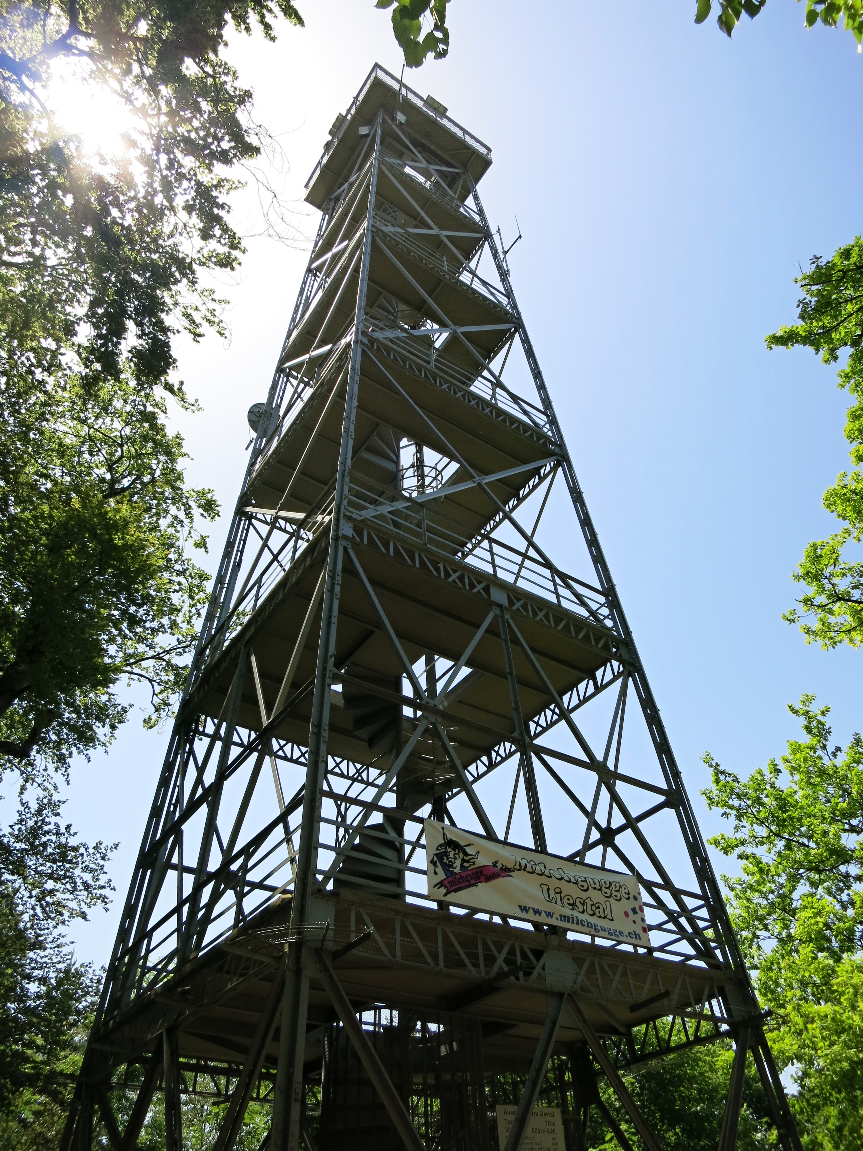 Schleifenbergturm